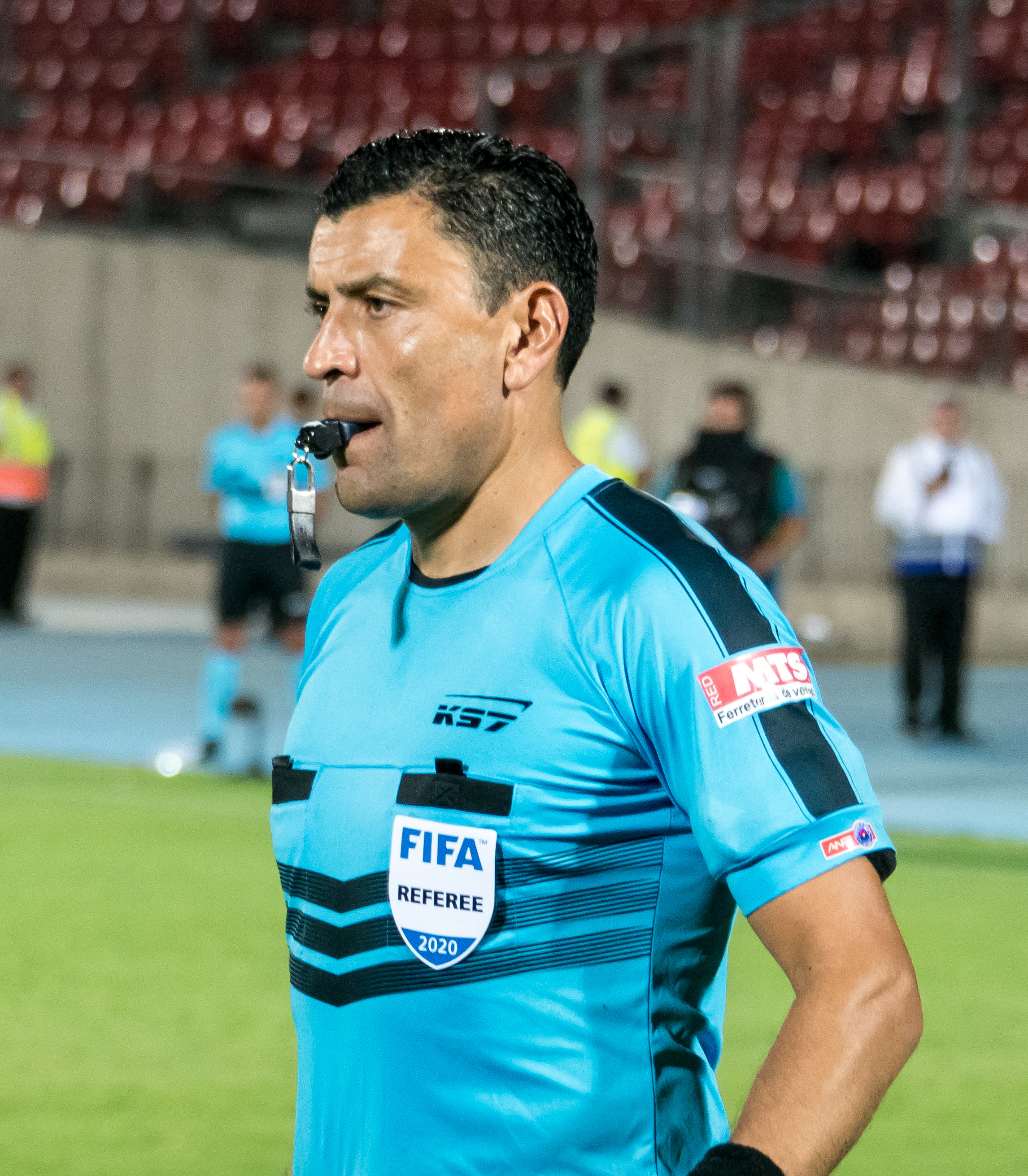 Deportes La Serena v Deportes Temuco, Estadio Nacional de Chile, Ñuñoa, Santiago, Región Metropolitana, Chile